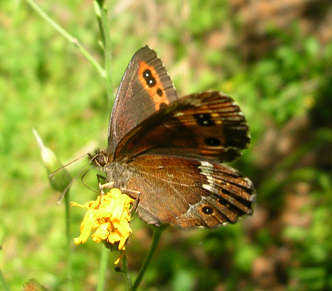 Weißbindiger Mohrenfalter (Weibchen) am Tauerntal-Wanderweg etwa im Bereich der Kalser Alm (1.445 Meter)